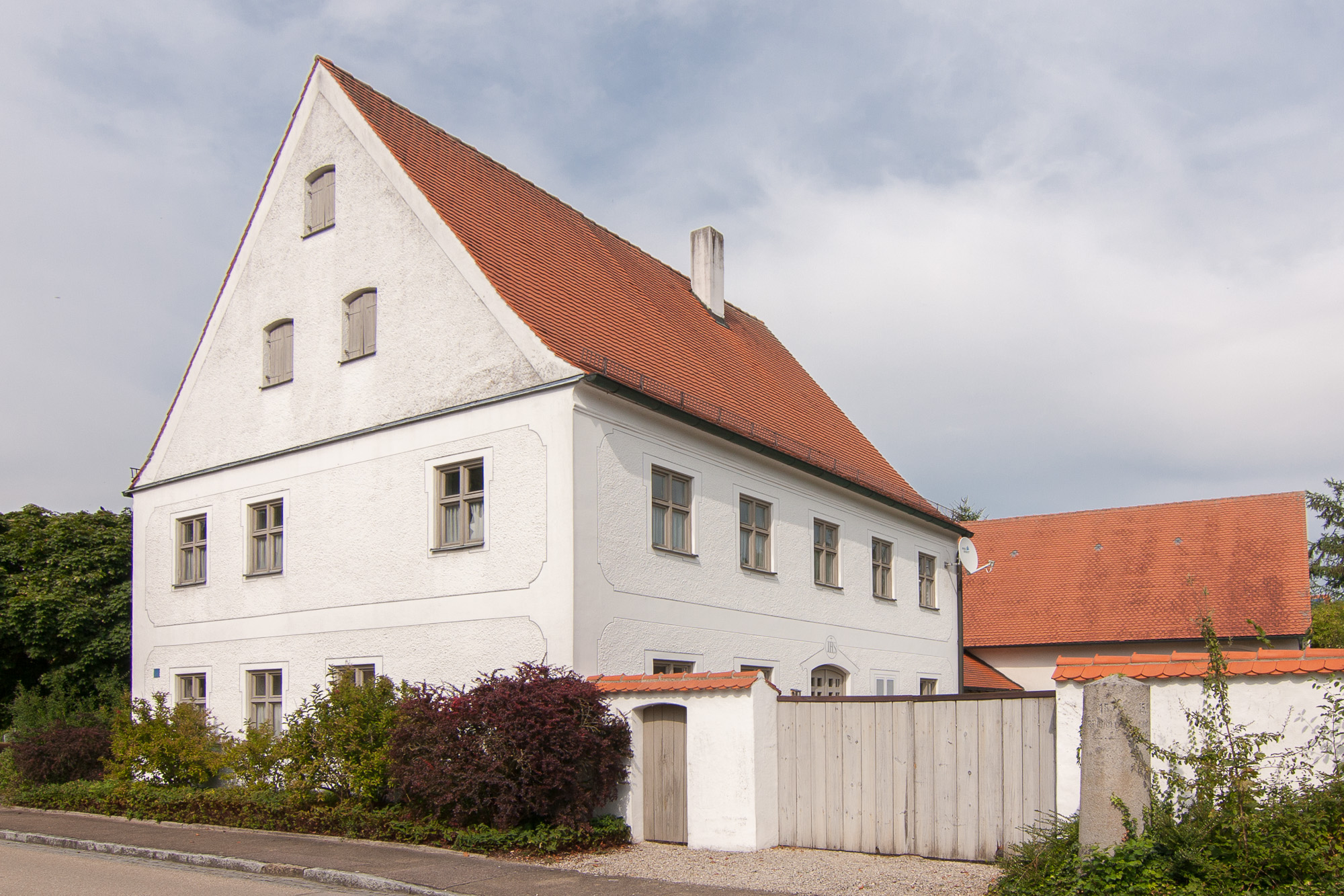 Pfarrhof mit Ökonomiegebäude; 1. Hälfte 18. JahrhundertThis is a photograph of an architectural monument.